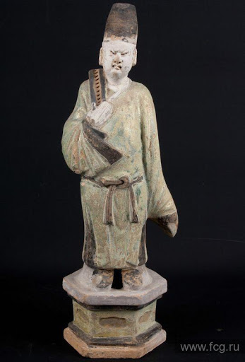 Статуетка чиновника мінської епохи